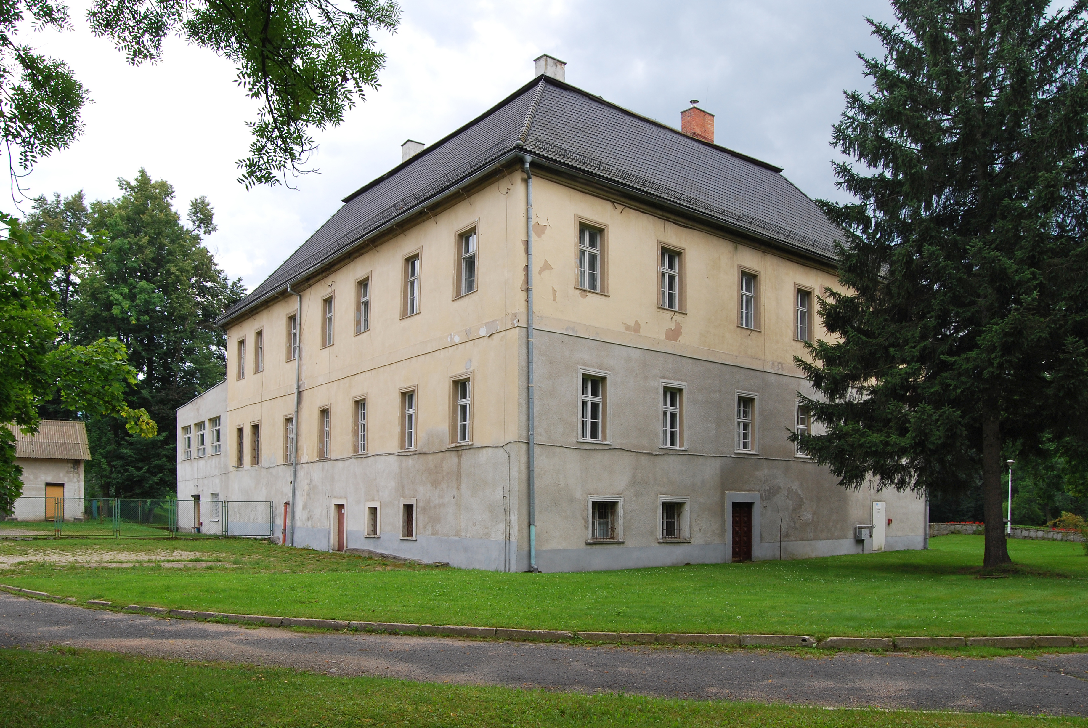 Pałac w Bukowcu, widok od strony północno-wschodniej